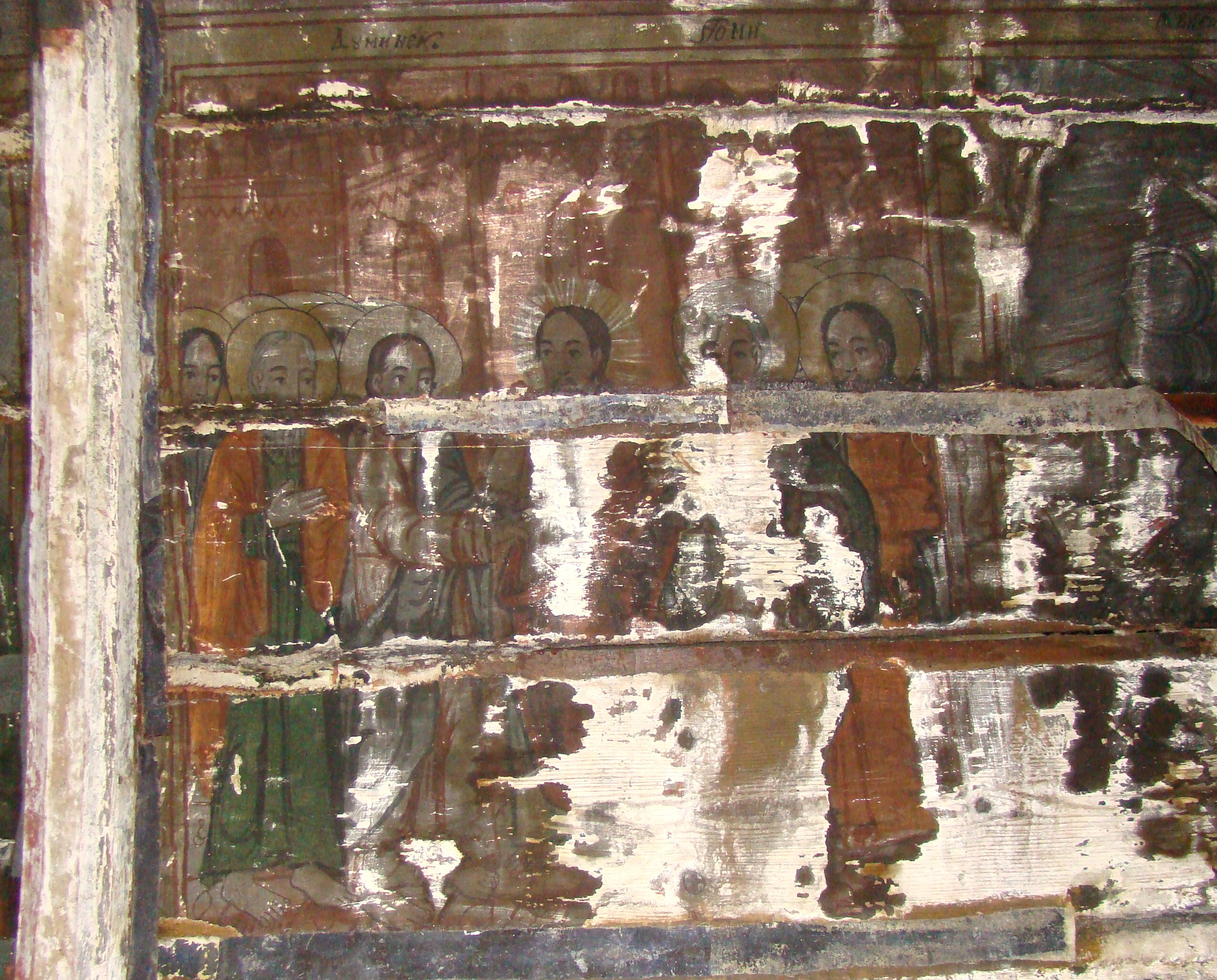 Biserica de lemn "Adormirea Maicii Domnului" a mănăstirii Bic, strămutată din satul Stâna